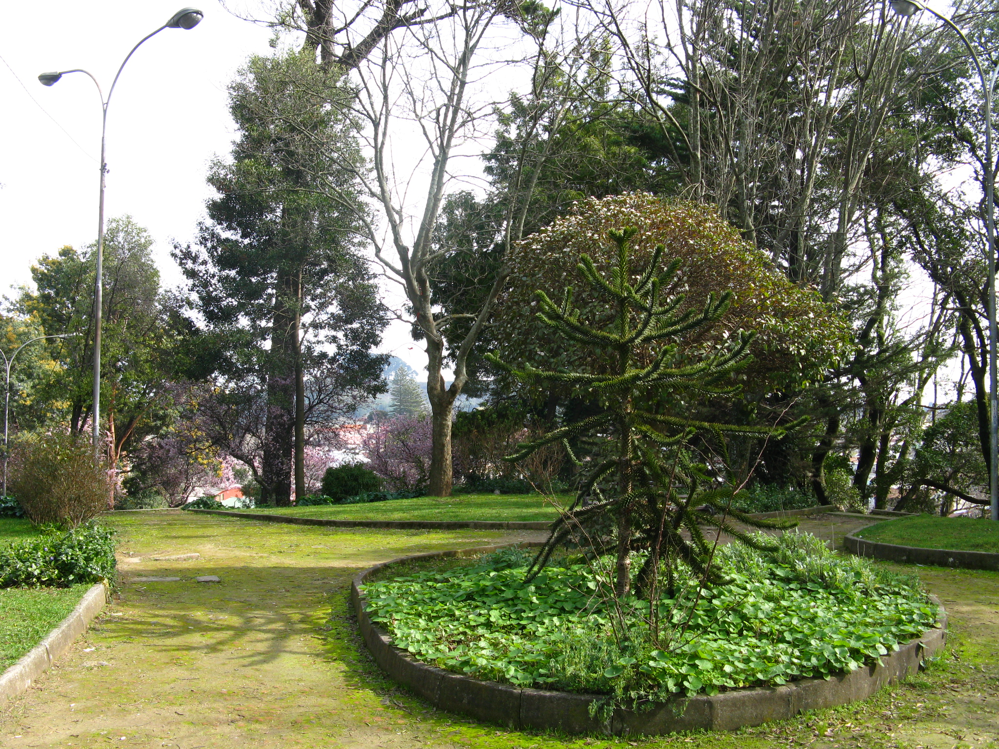 Cima del Cerro Amarillo, con una Araucaria Concepción, Chile Agosto de 2012